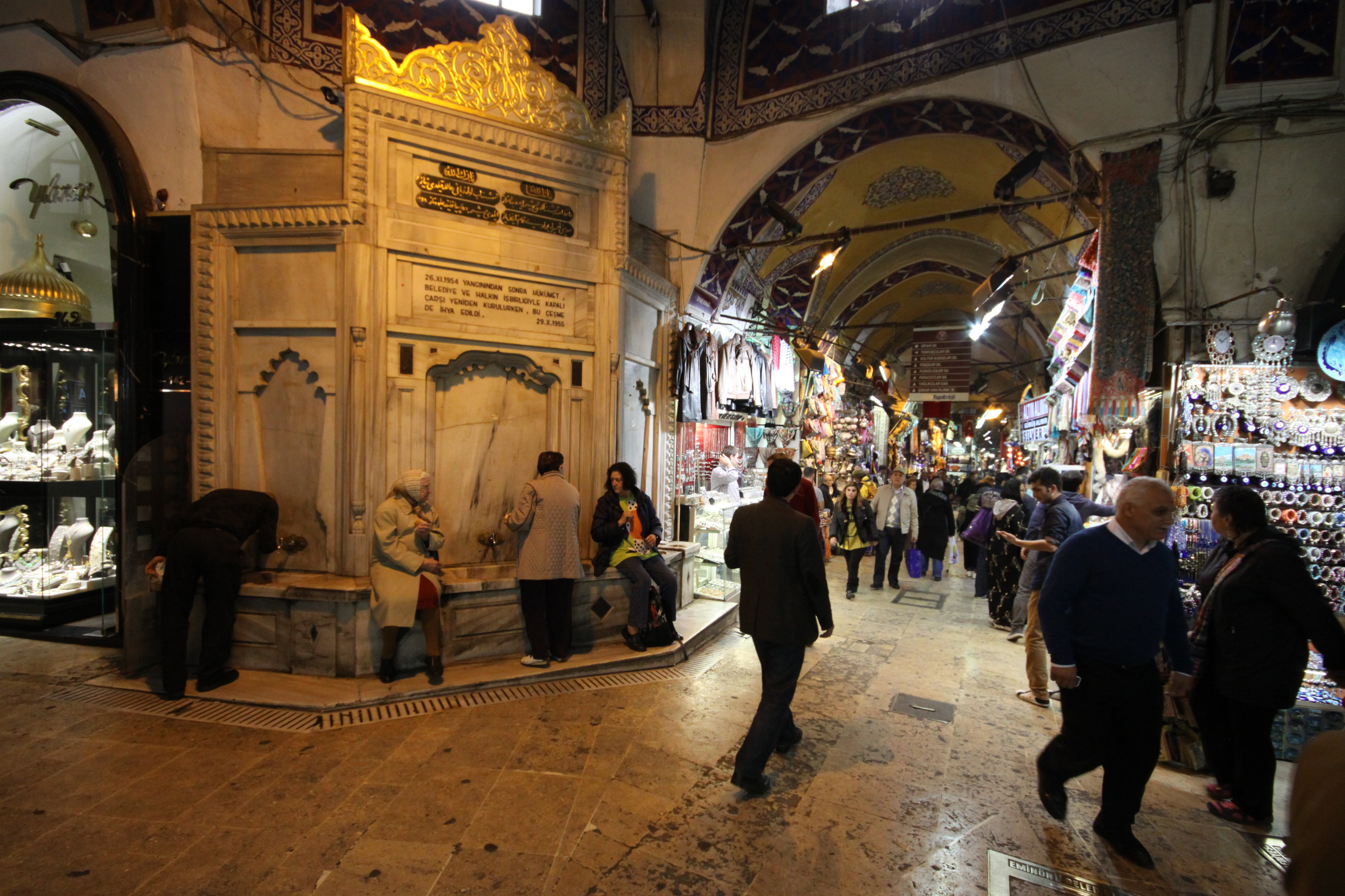 Grand Bazaar, Istanbul